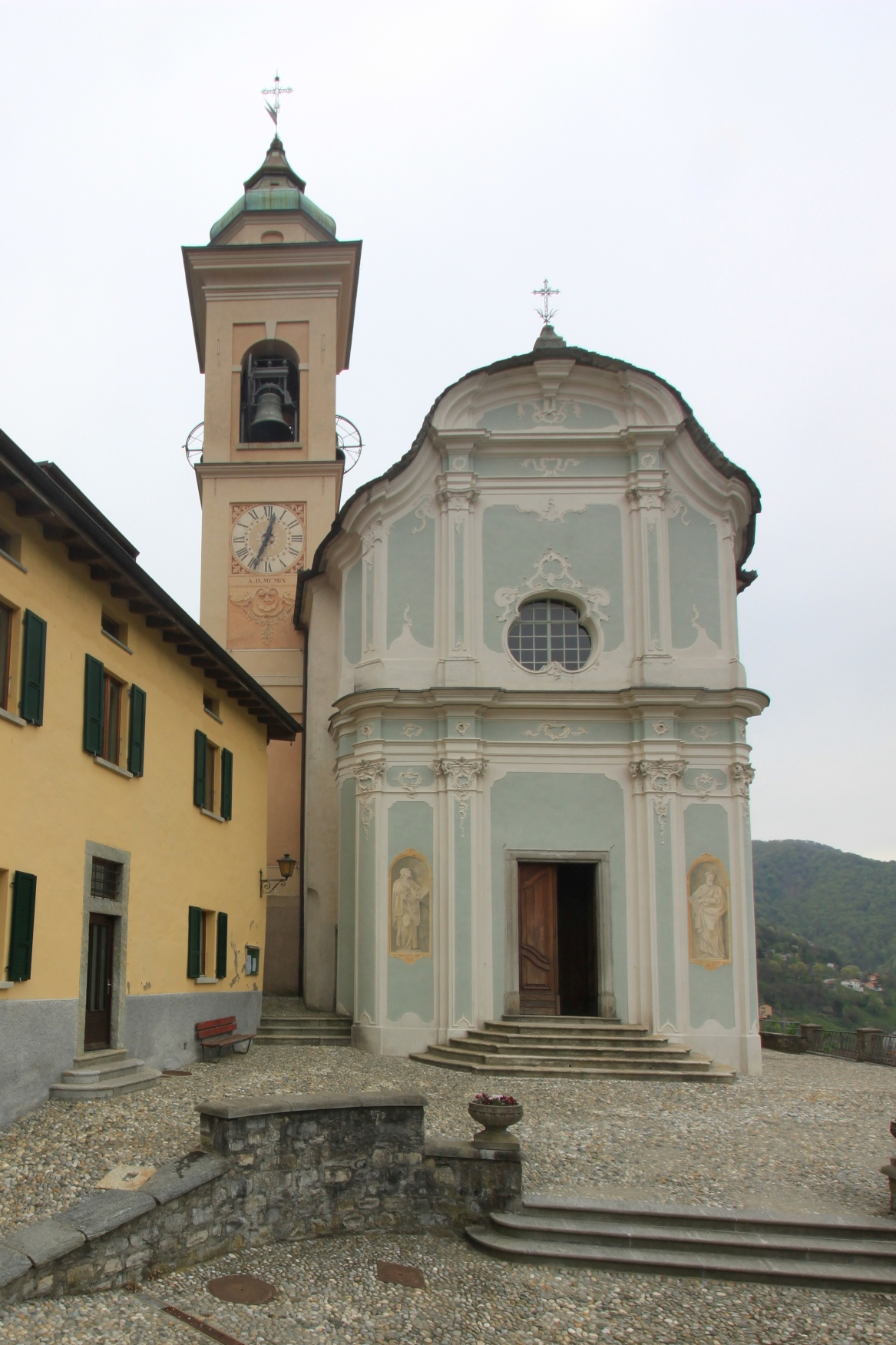 Muggio, TI -- Chiesa cattolica San Lorenzo, 1760